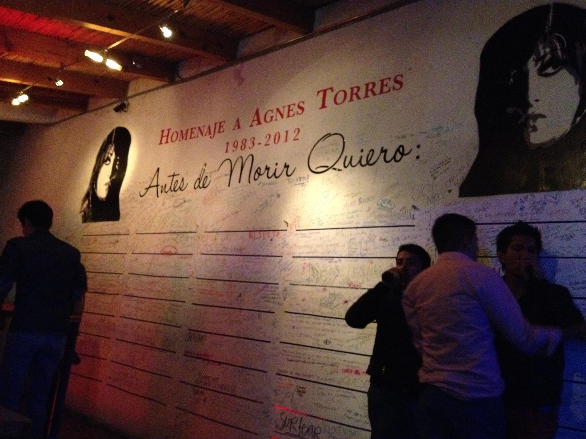 Mural en memoria de la activista transgénero Agnes Torres. San Andrés Cholula, Puebla.